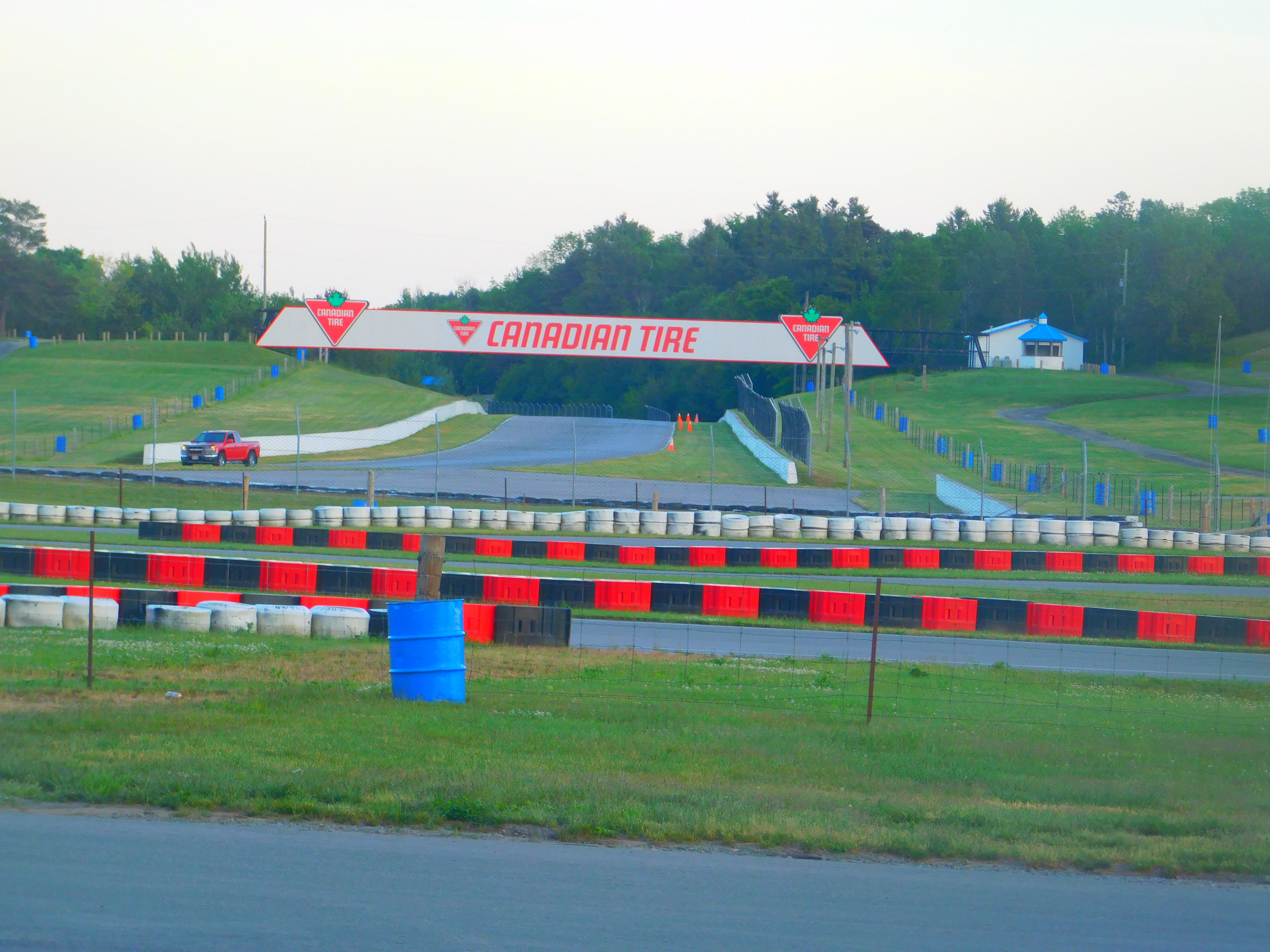 Bowmanville, Ontario